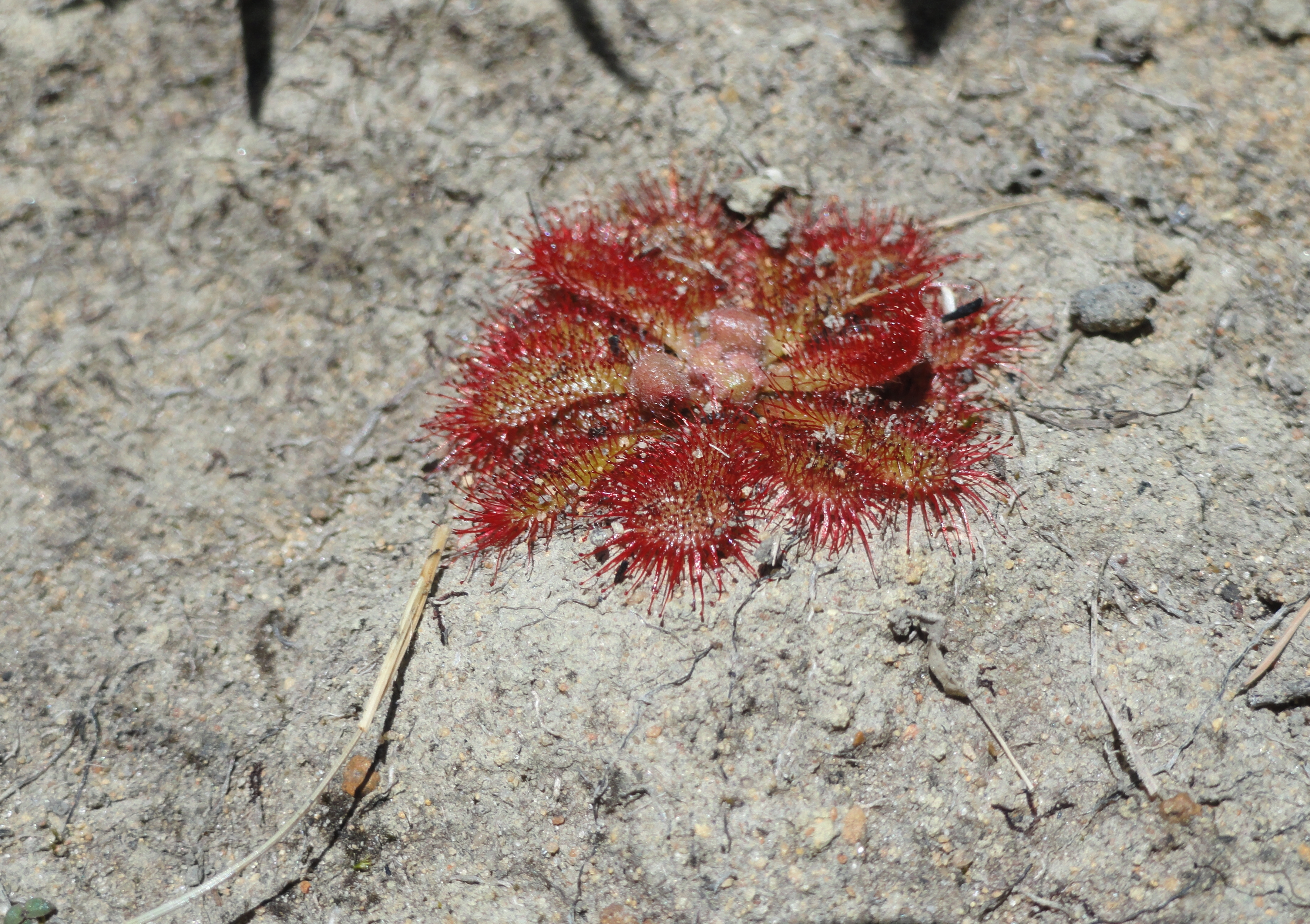 A planta carnívora Drosera tentaculata exibe um vistoso vermelho vinho nos seus tentáculos - Chapada dos Veadeiros GO, (2013)